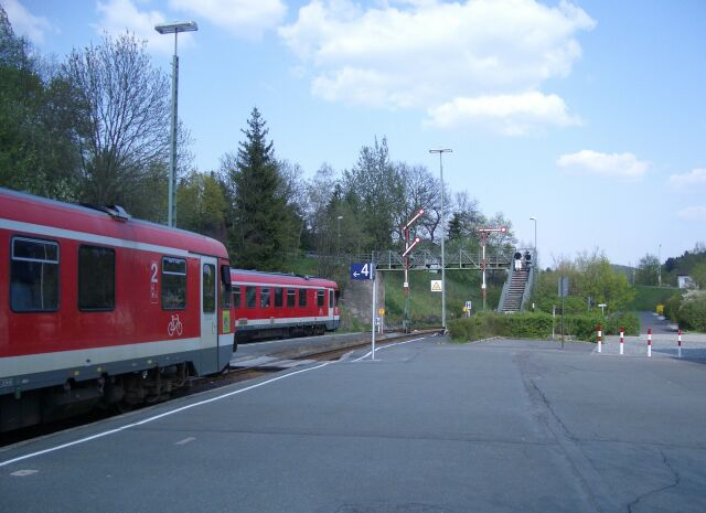 Kreuzung zweier Regionalbahnen der Strecke Hof-Bad Steben in Selbitz. Im Hintergrund die beiden Ausfahrsignale Richtung Hof an der Luftbrücke. Rechts neben der Luftbrücke verlief die Trasse der Bahnstrecke nach Münchberg.